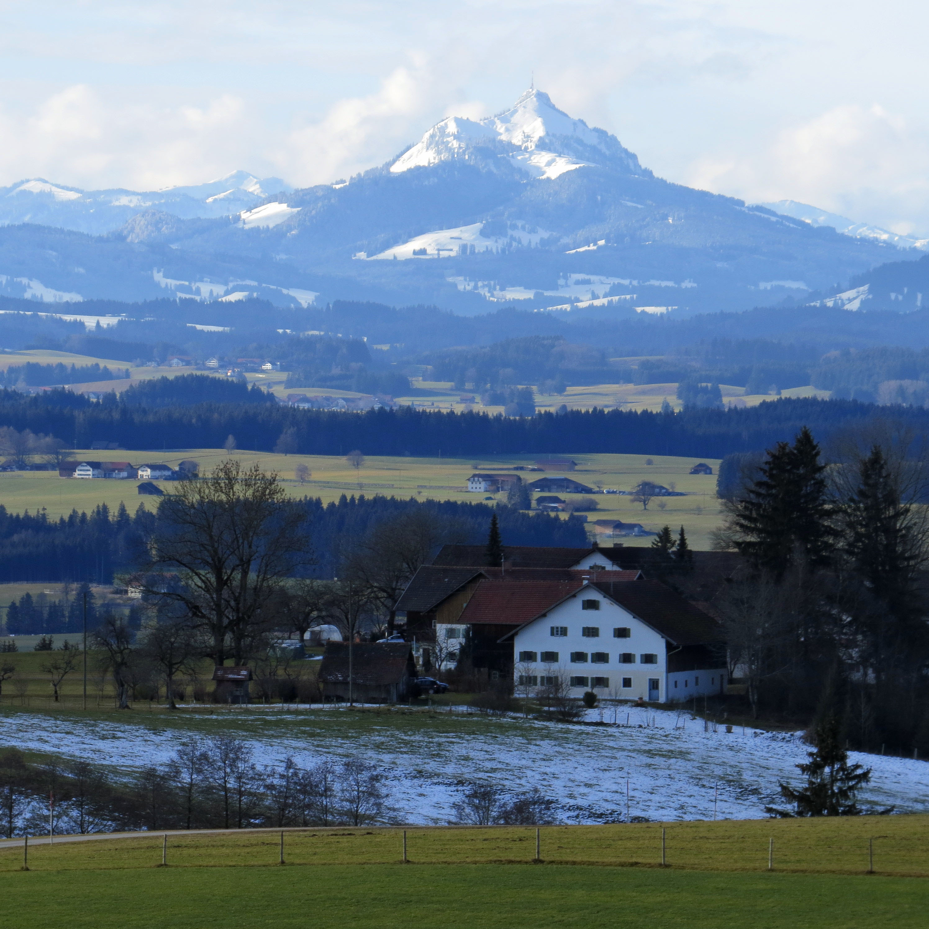 Grünten von Nordosten, im Vordergrund Settele am Auerberg